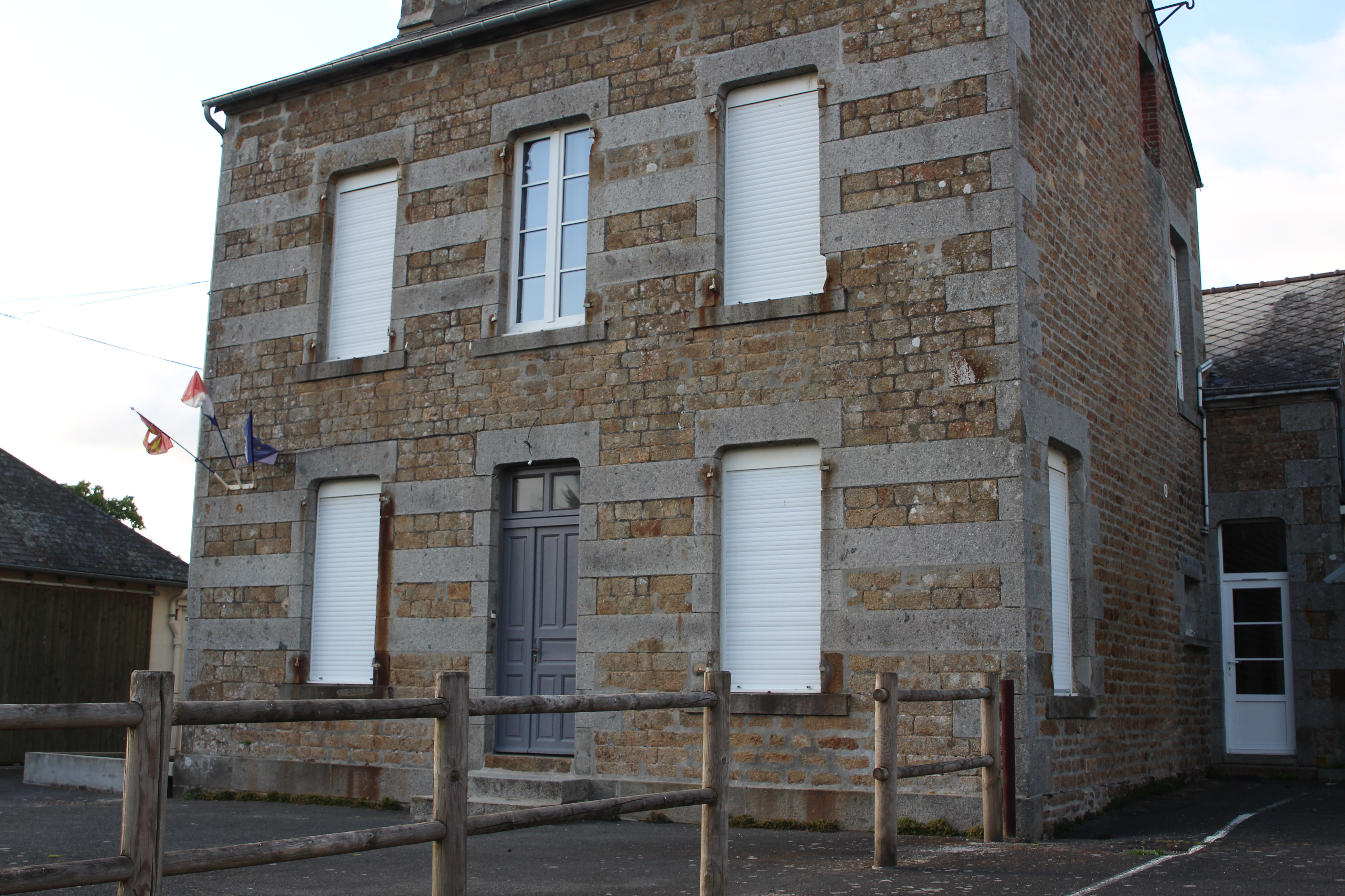 La Motte-Fouquet, Orne